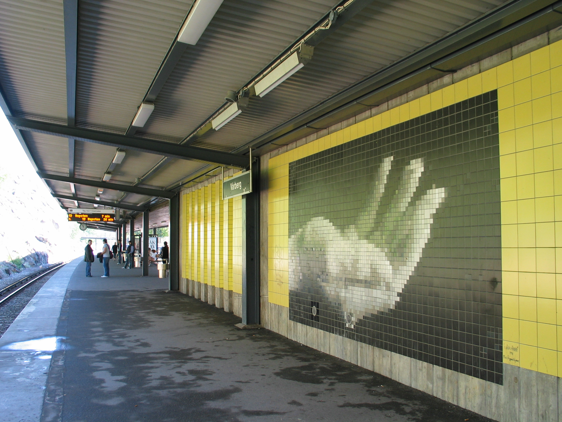 Vårberg, a metro station in Stockholm, Sweden.